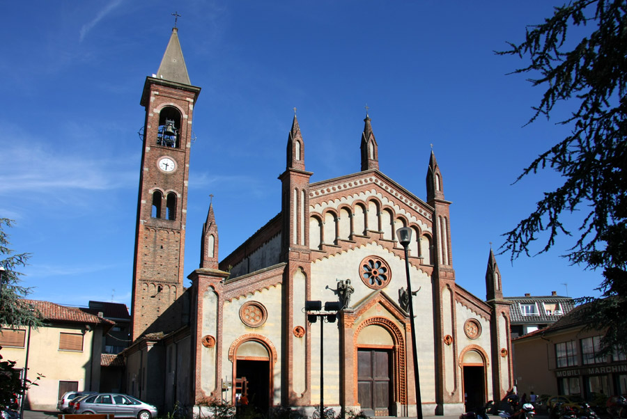 La chiesa parrocchiale dei Santi Nazzaro e Celso a Sannazzaro de' Burgondi (PV)